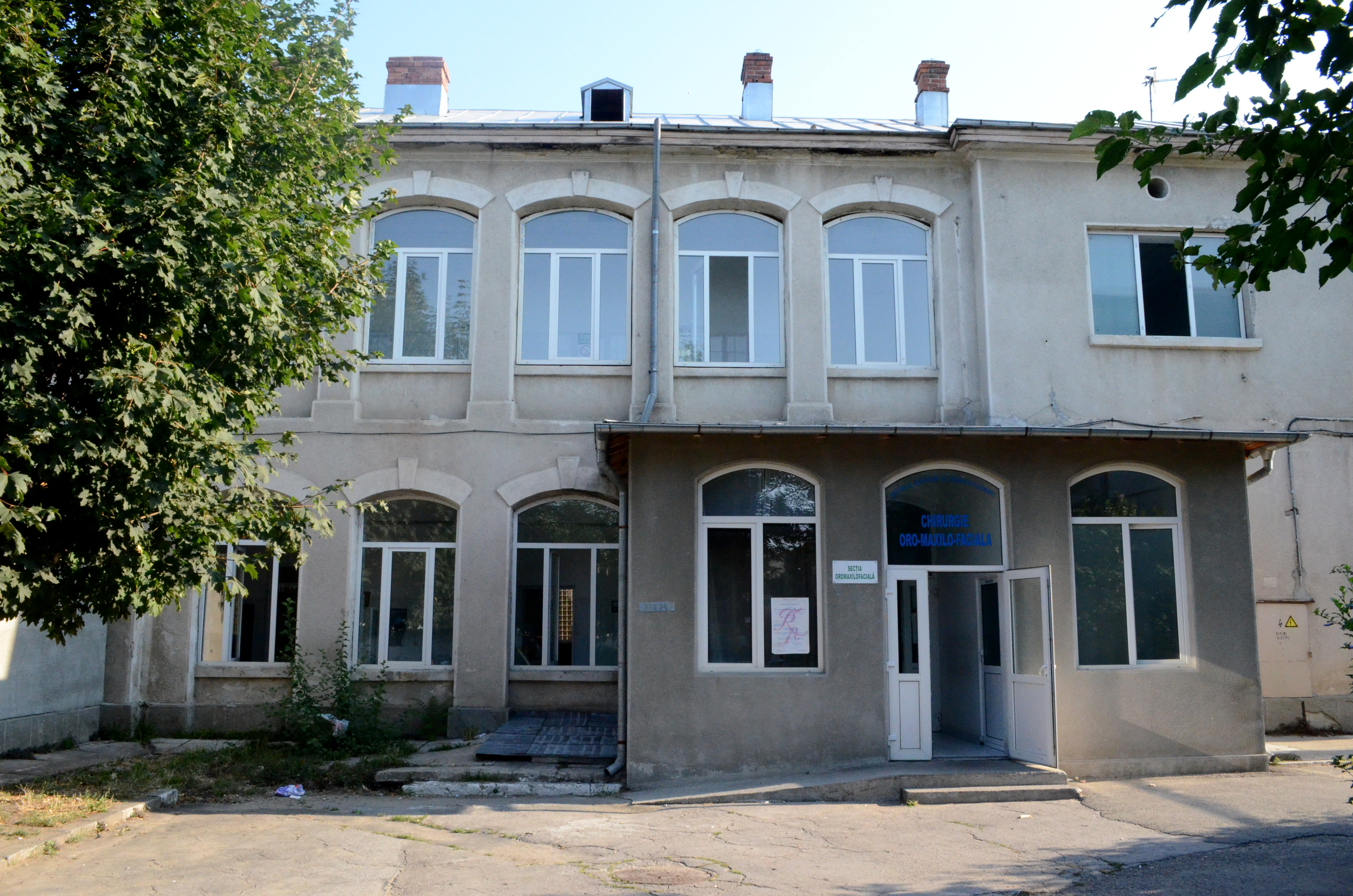 Secția Oro-maxilo-facială a Spitalului Boldescu